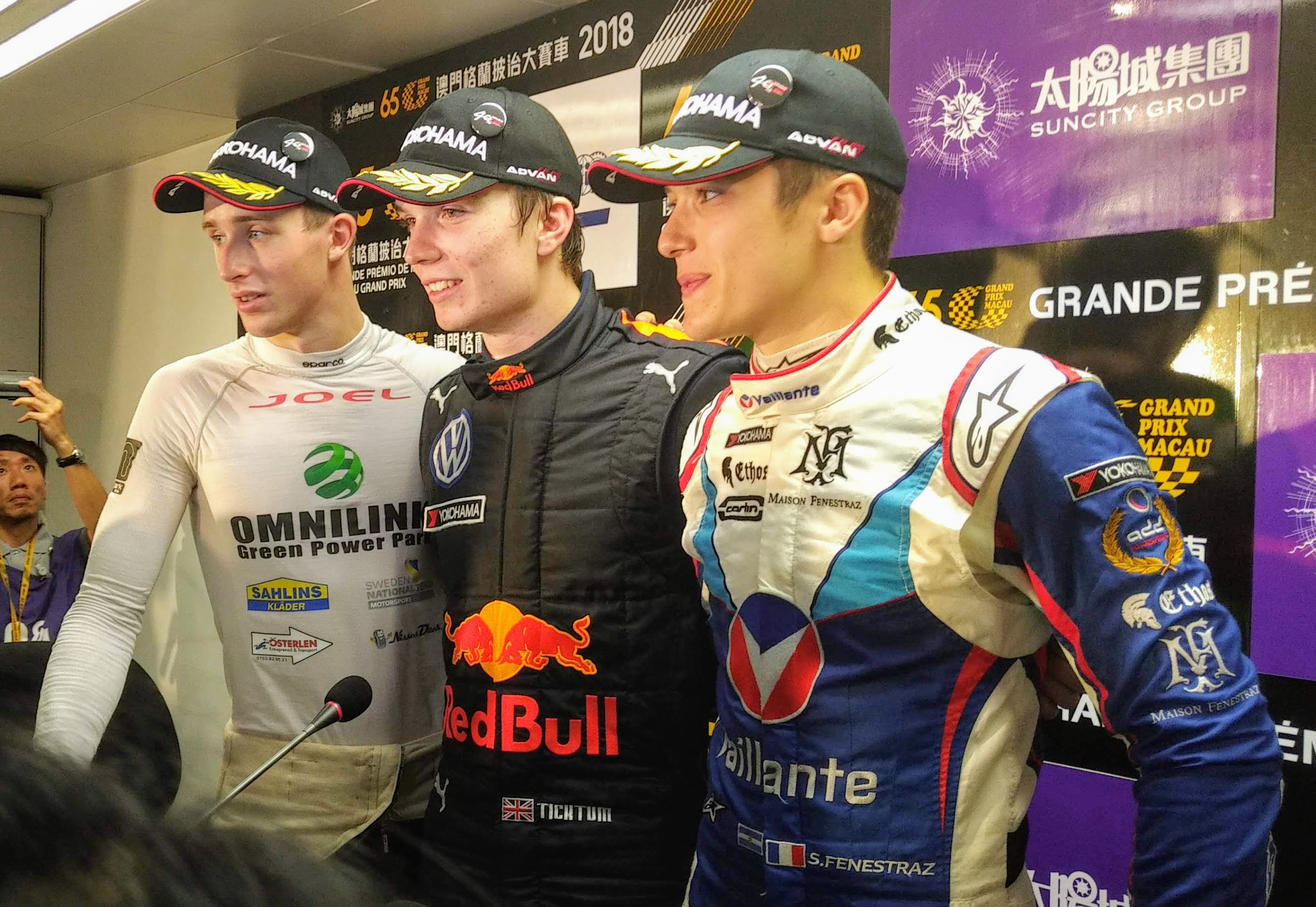 Dan Ticktum consagrado bicampeão do Grande Prémio de Macau de Fórmula 3 Suncity Grupo – Taça do Mundo de F3 da FIA